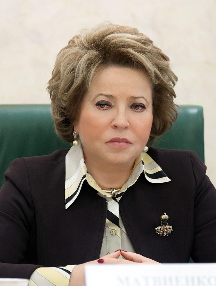 Парламентские слушания на тему «Уголовная политика в Российской Федерации: проблемы и решения»